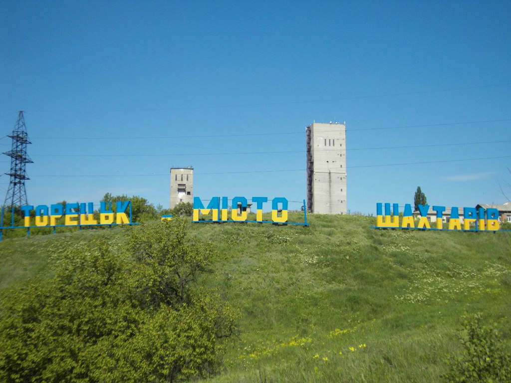 Озеленений фрагмент діючого терикону та Чумаківський ствол шахти імені Ф. Дзержинського із написом "Торецьк - місто шахтарів", яку було встановлено замість «Дзержинськ - місто шахтарів» в 2016 р.